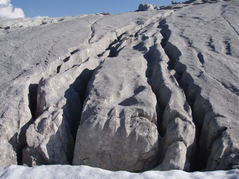 Detail der bei "nackten" Karstoberflächen typischen Karrenbildung, hier Silberen im Muotatal, Kanton Schwyz.